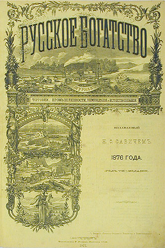 Русское богатство, 1876 г.